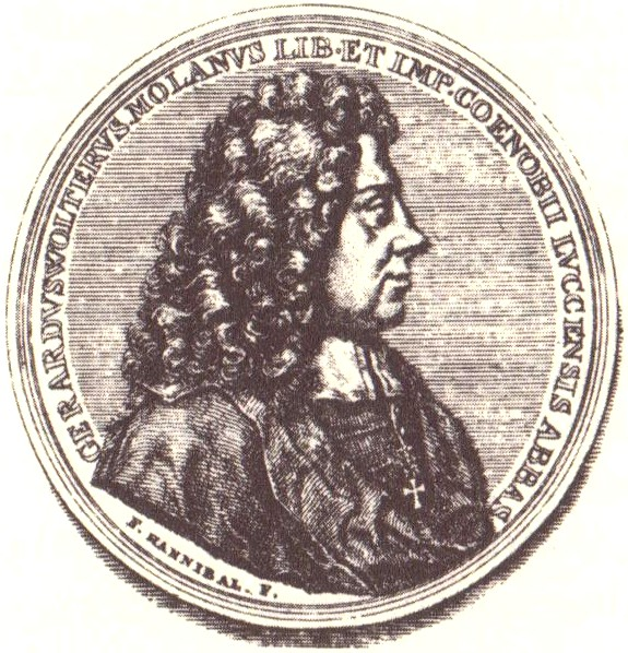 Gerhard Wolter Molanus (1633-1722), lutherischer Theologe, Abt von Loccum, Konsistorialdirektor in Hannover; zeitgenössischer Entwurf für eine Gedenkmünze